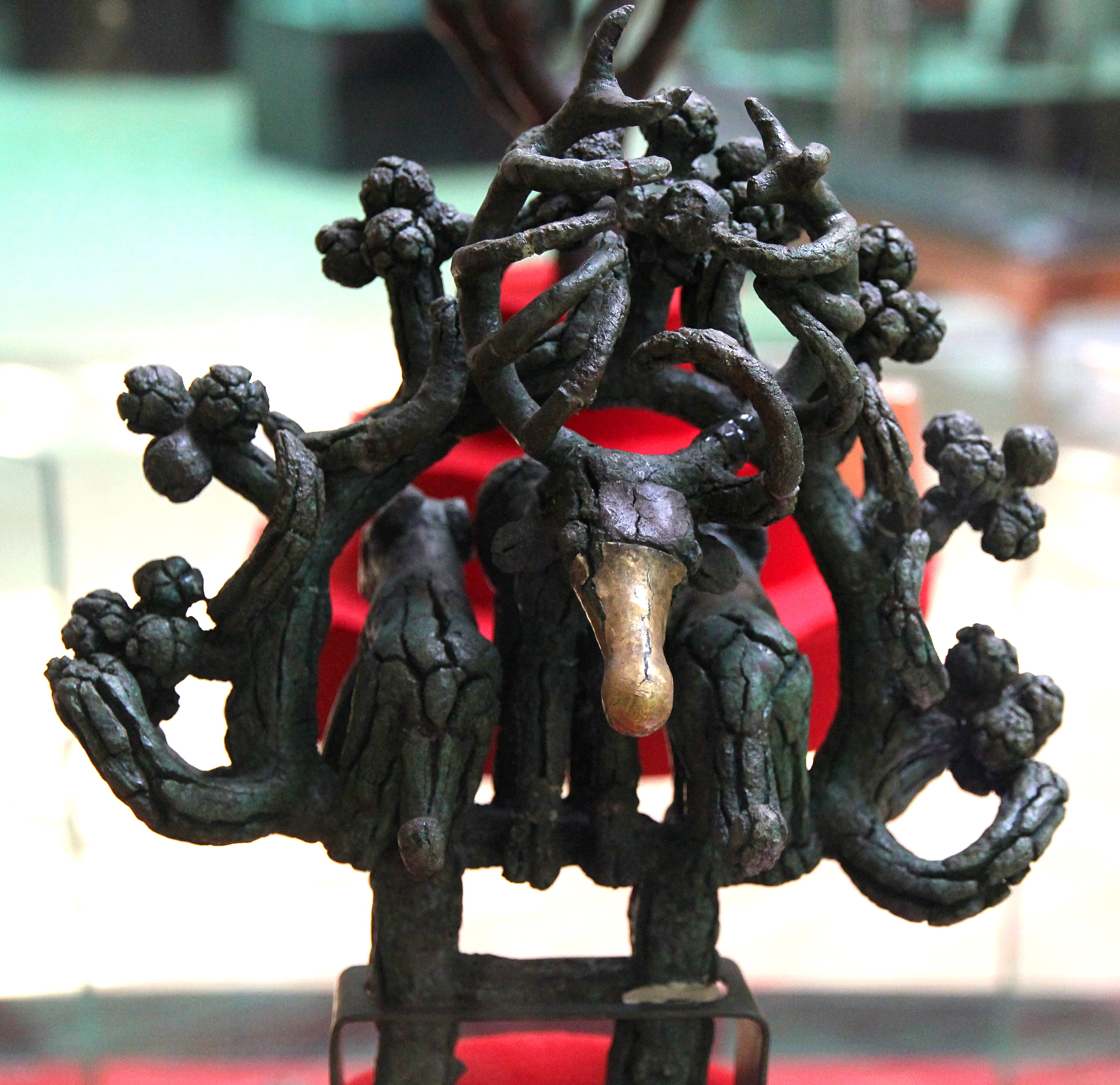 Standarte aus Alaca Höyük mit Darstellung eines Hirsches und zweier Löwen oder Panther im Museum für anatolische Zivilisationen in Ankara. Die Schnauze des Hirsches ist mit Goldblech überzogen